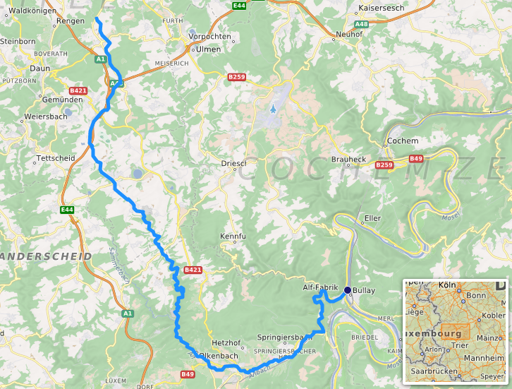 carte réalisée sur umap [1] This map may be incomplete, and may contain errors. Don't rely solely on it for navigation.